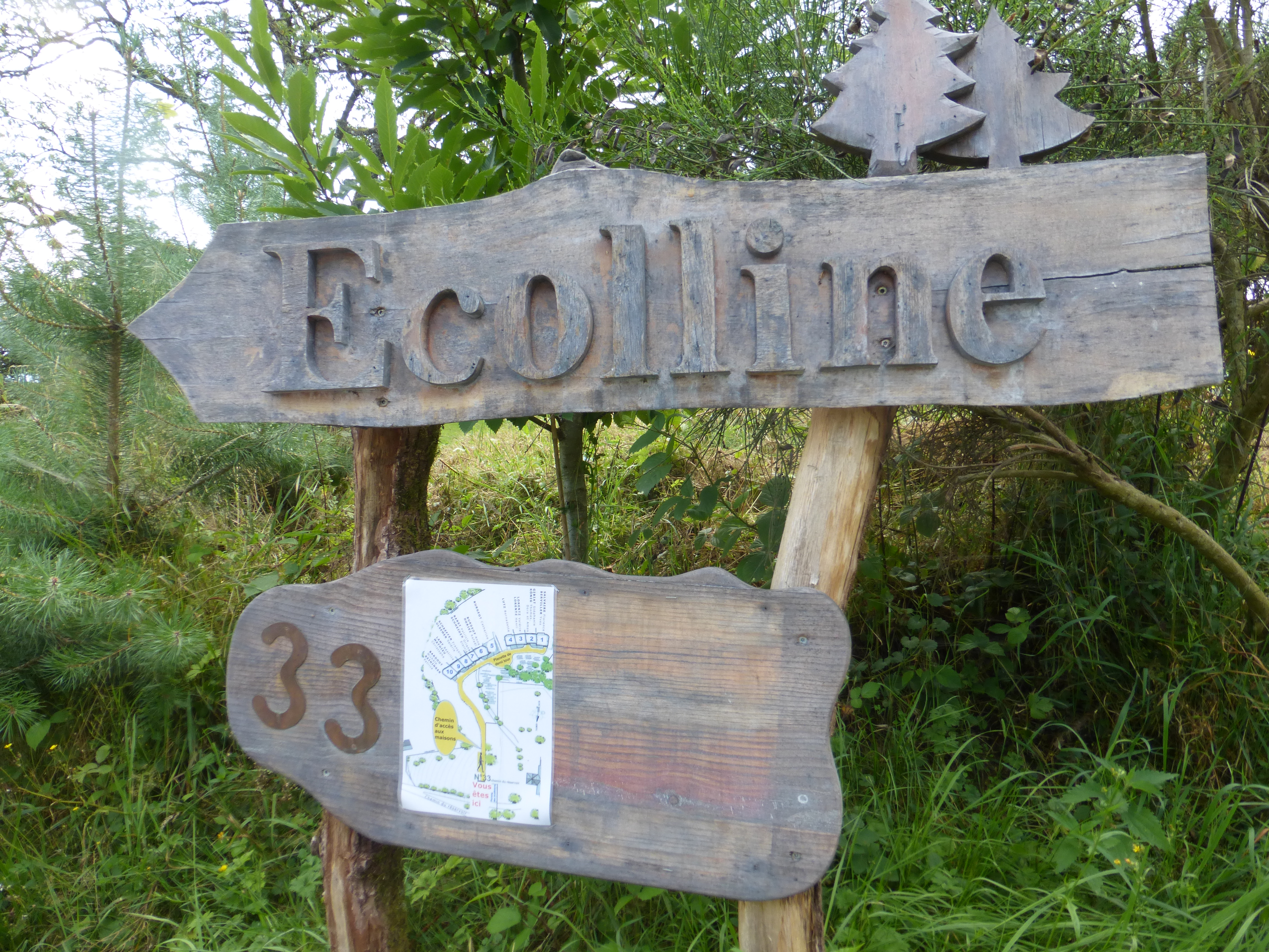 Entrée du lotissement autogéré Ecolline à La Bolle